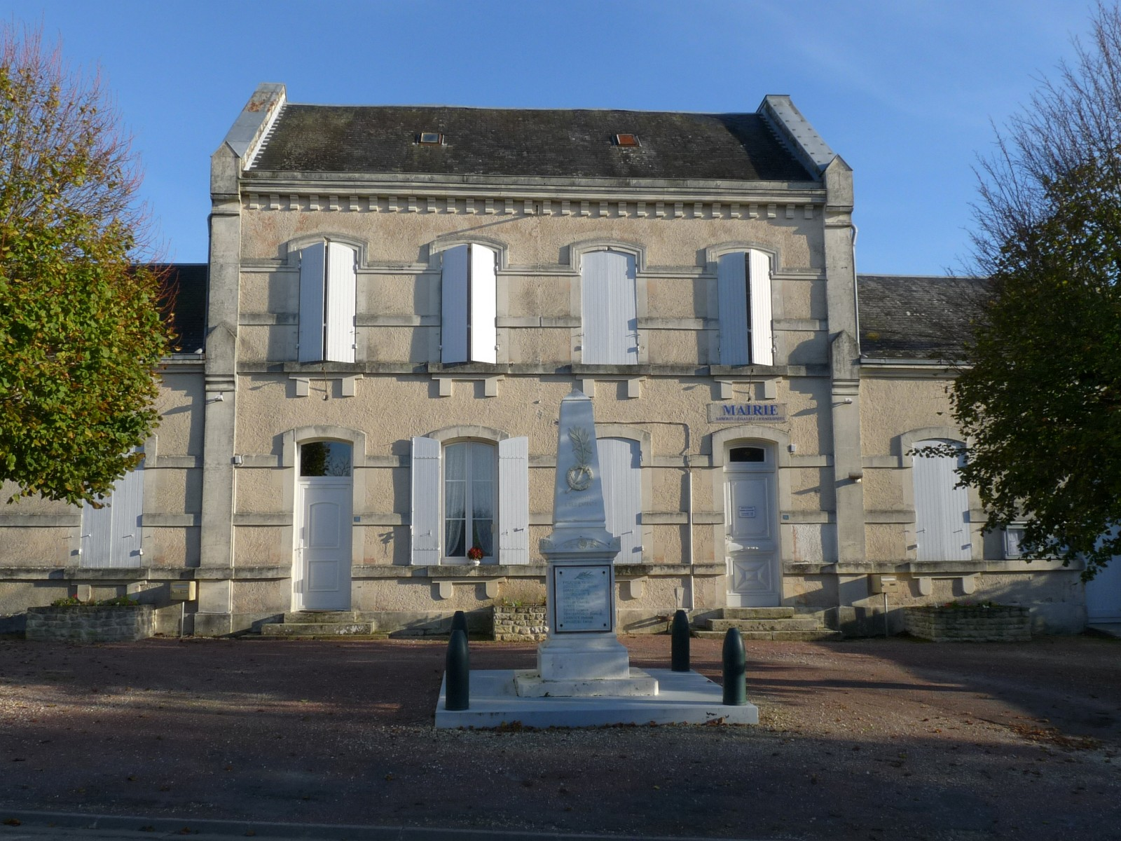 Mairie de Louzignac, Charente-Maritime, France